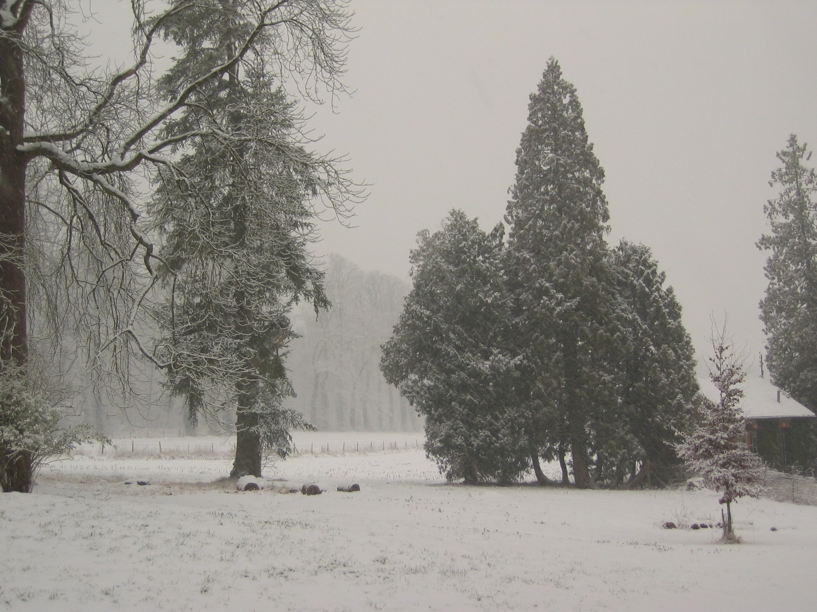 Le parc de l'Institut national agronomique à Thiverval-Grignon sous la neige.